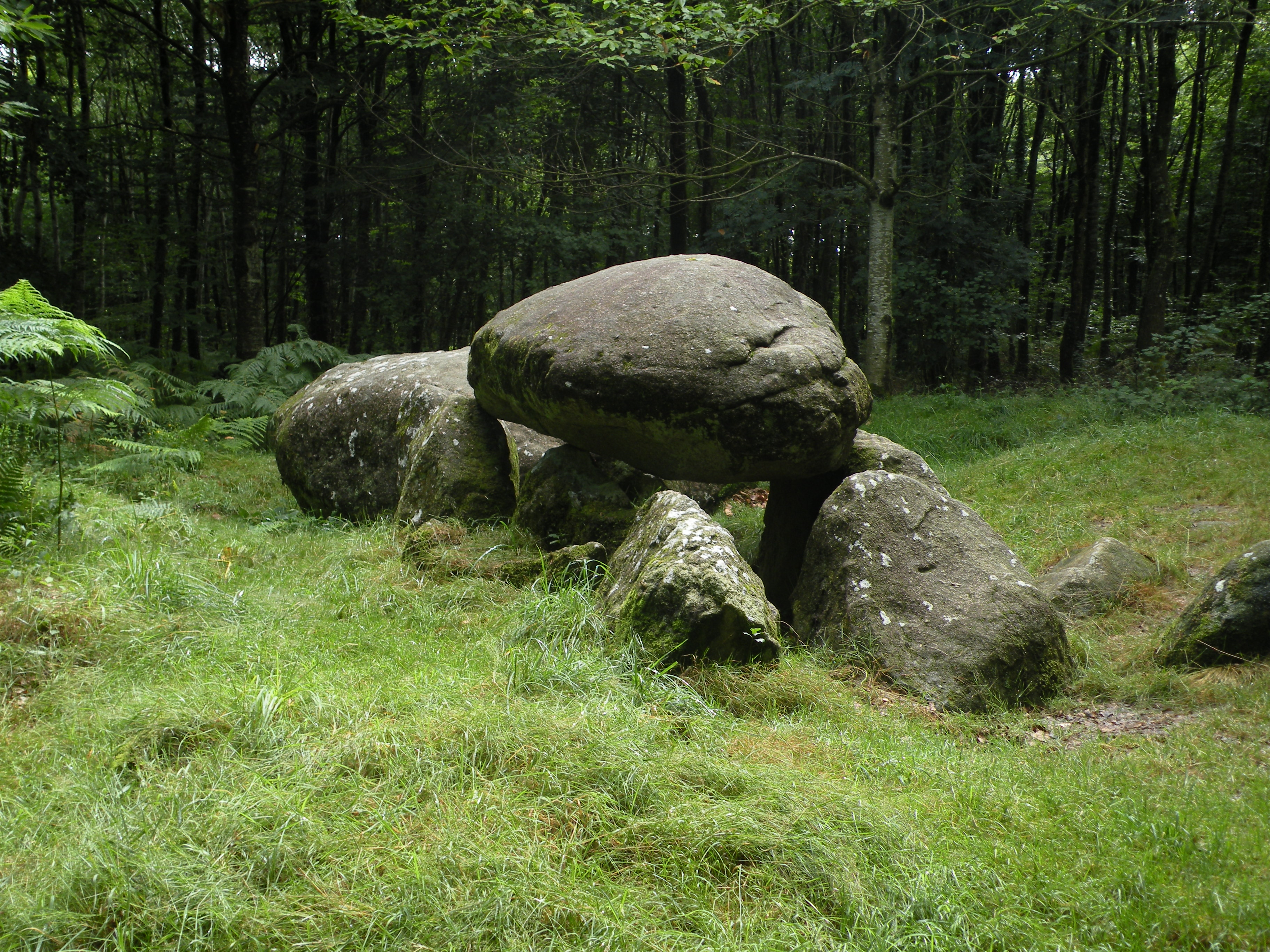 Le dolmen de la « Pierre Courcoulée » à Landéan.